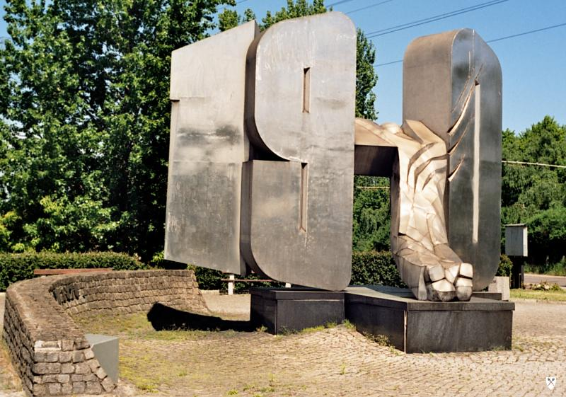 Pomnik Ofiar Grudnia 1970 w Gdyni, 2004r. Autor zdjęcia: Topory